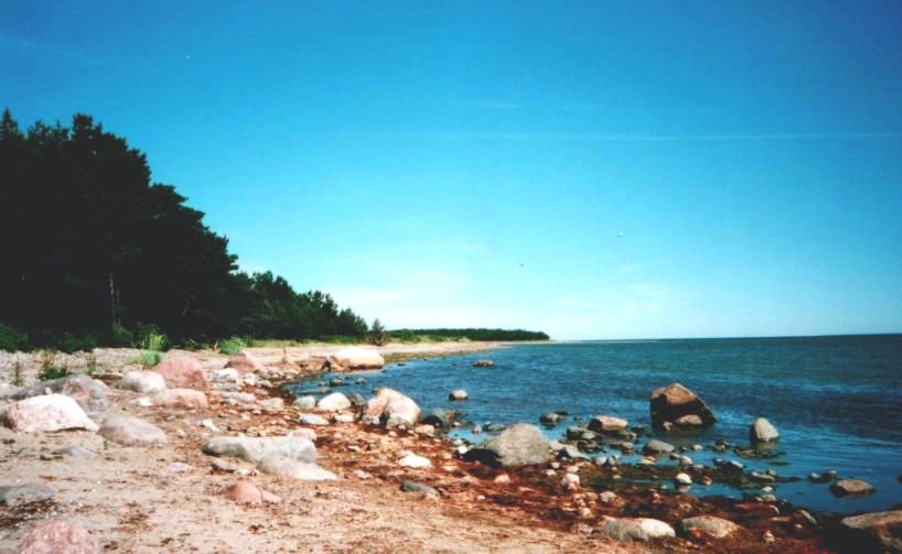 Aegna (island of Estonia) coast. Pobřeží ostrova Aegna.